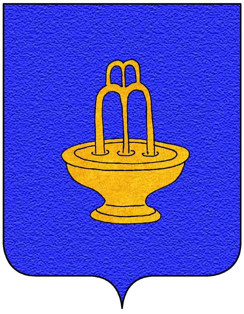 Stemma della famiglia Fonte, appartenente al patriziato di Venezia.